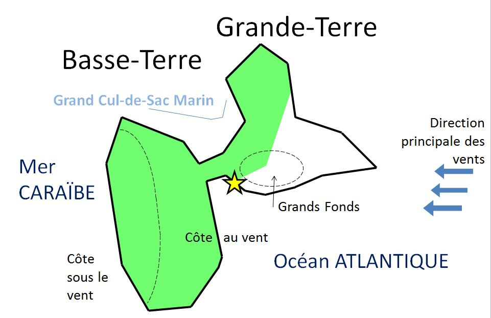 Carte simplifiée de la Guadeloupe, en vert le Parc national, indication des noms de lieux et repères géographiques utiles